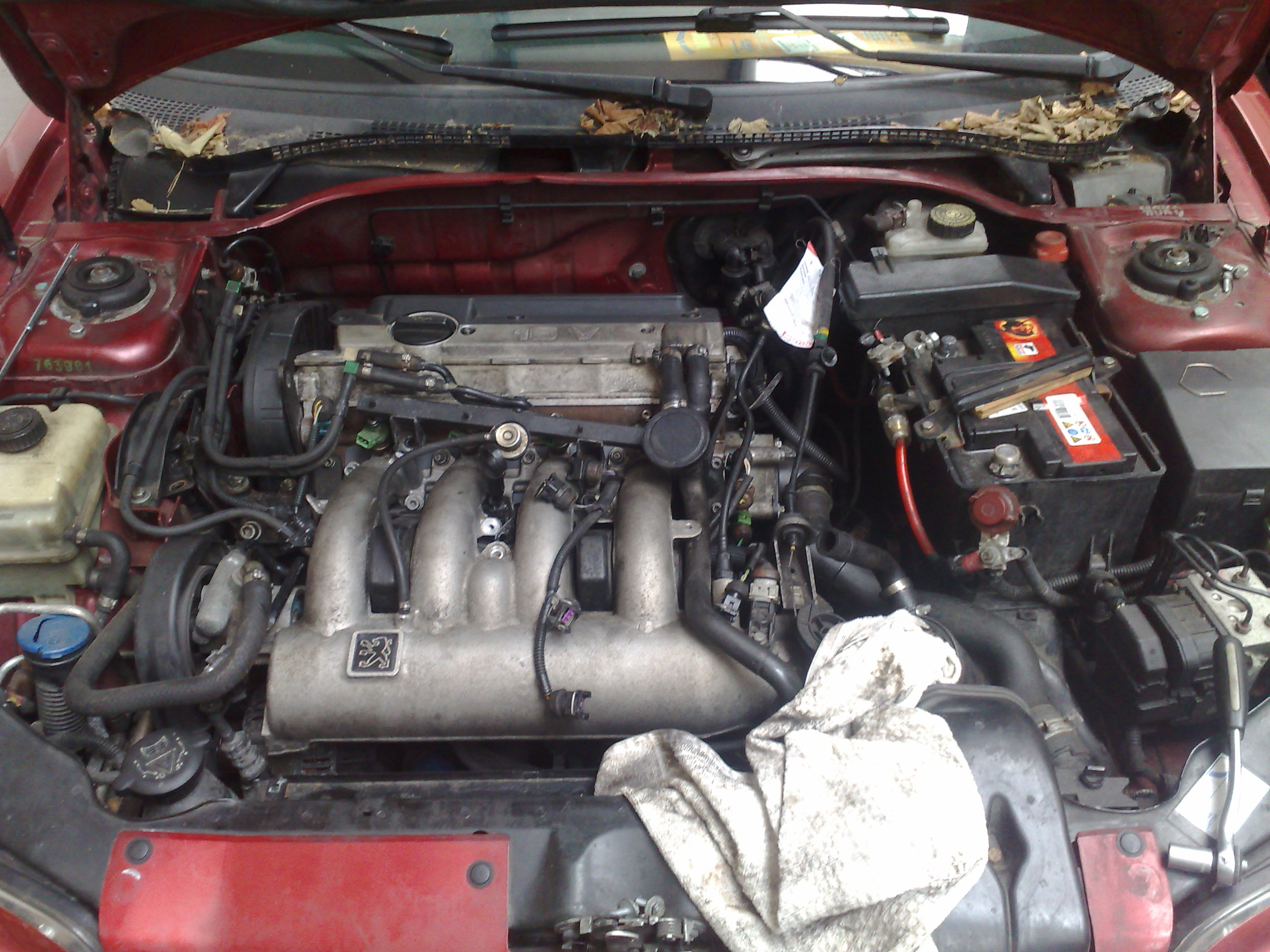 Engine Peugeot S16 (GTI)